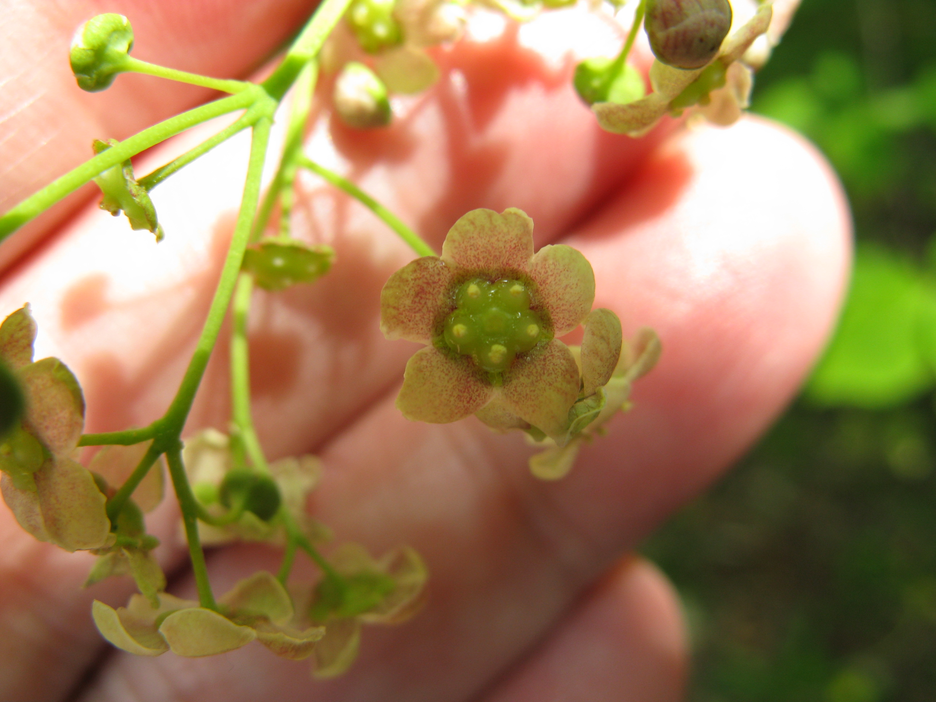 Scientific name Euonymus planipes